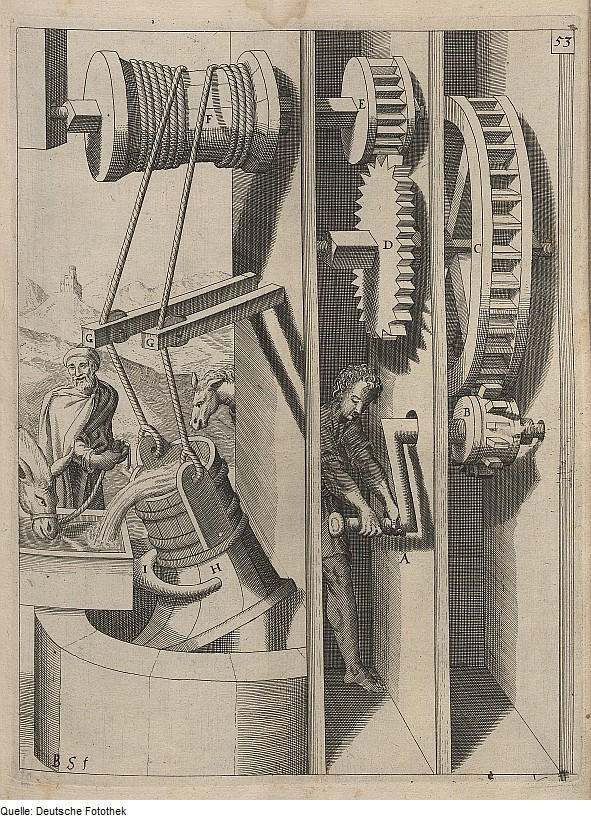 Original image description from the Deutsche Fotothek Mechanik & Wasserförderung & Schöpfwerk & Winde & Seil